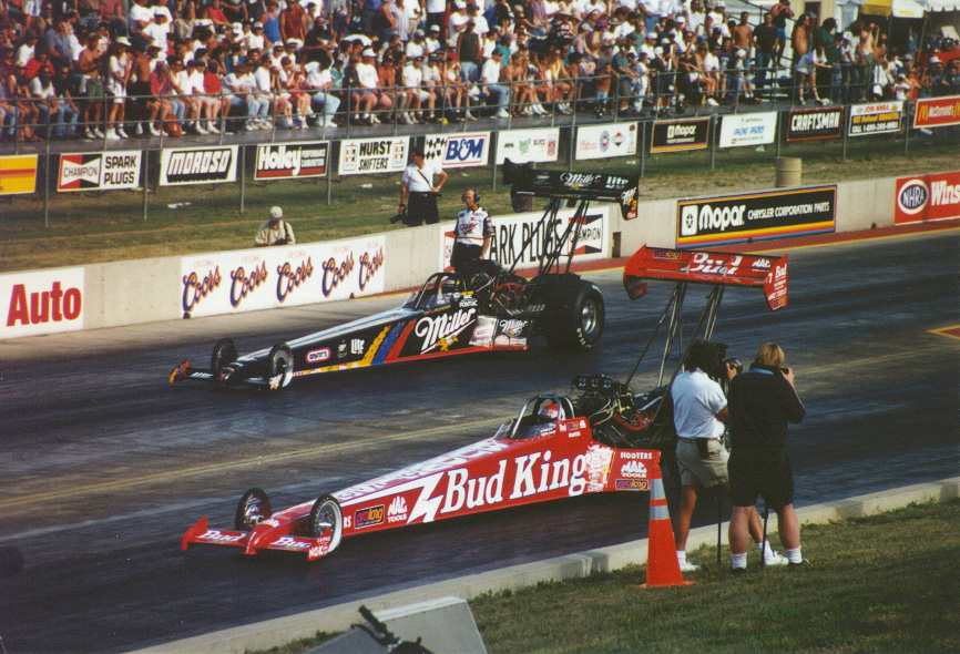 Beer Wars - Kenny Bernstein Bud King vs. Larry Dixon (drag racer) Miller dragsterBeer Wars 1